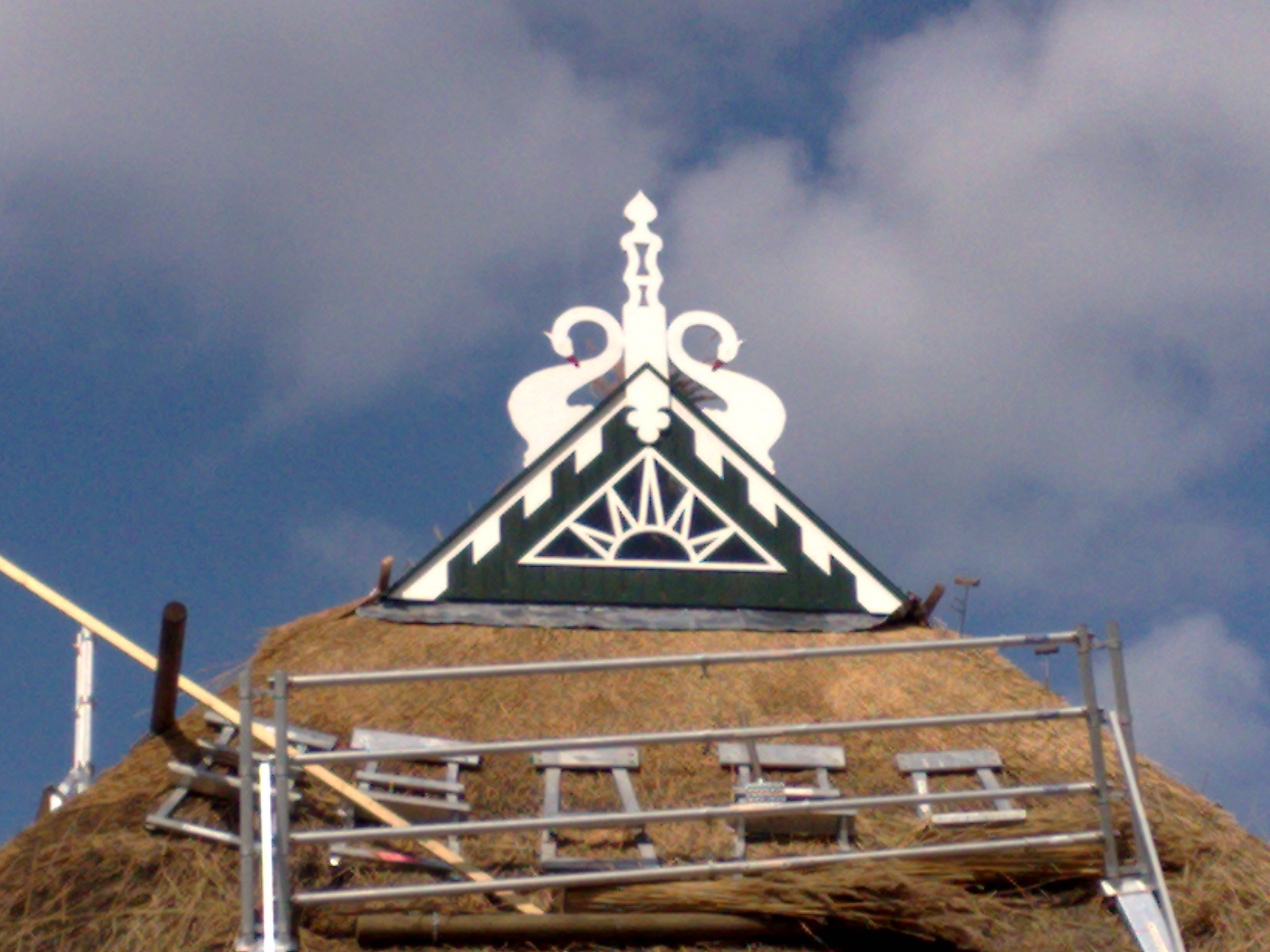 volkunststof uilenbord te surhuisterveen geleverd door